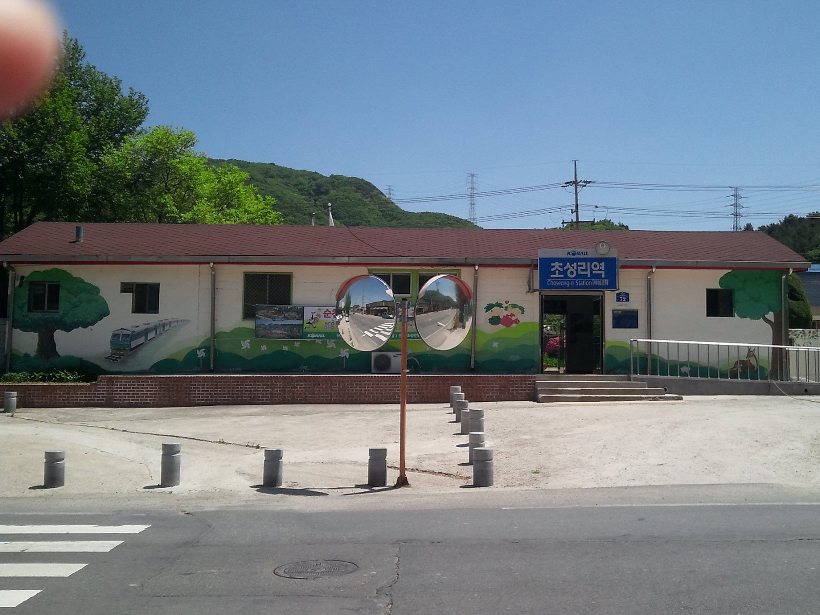 초성리역 역사 전경